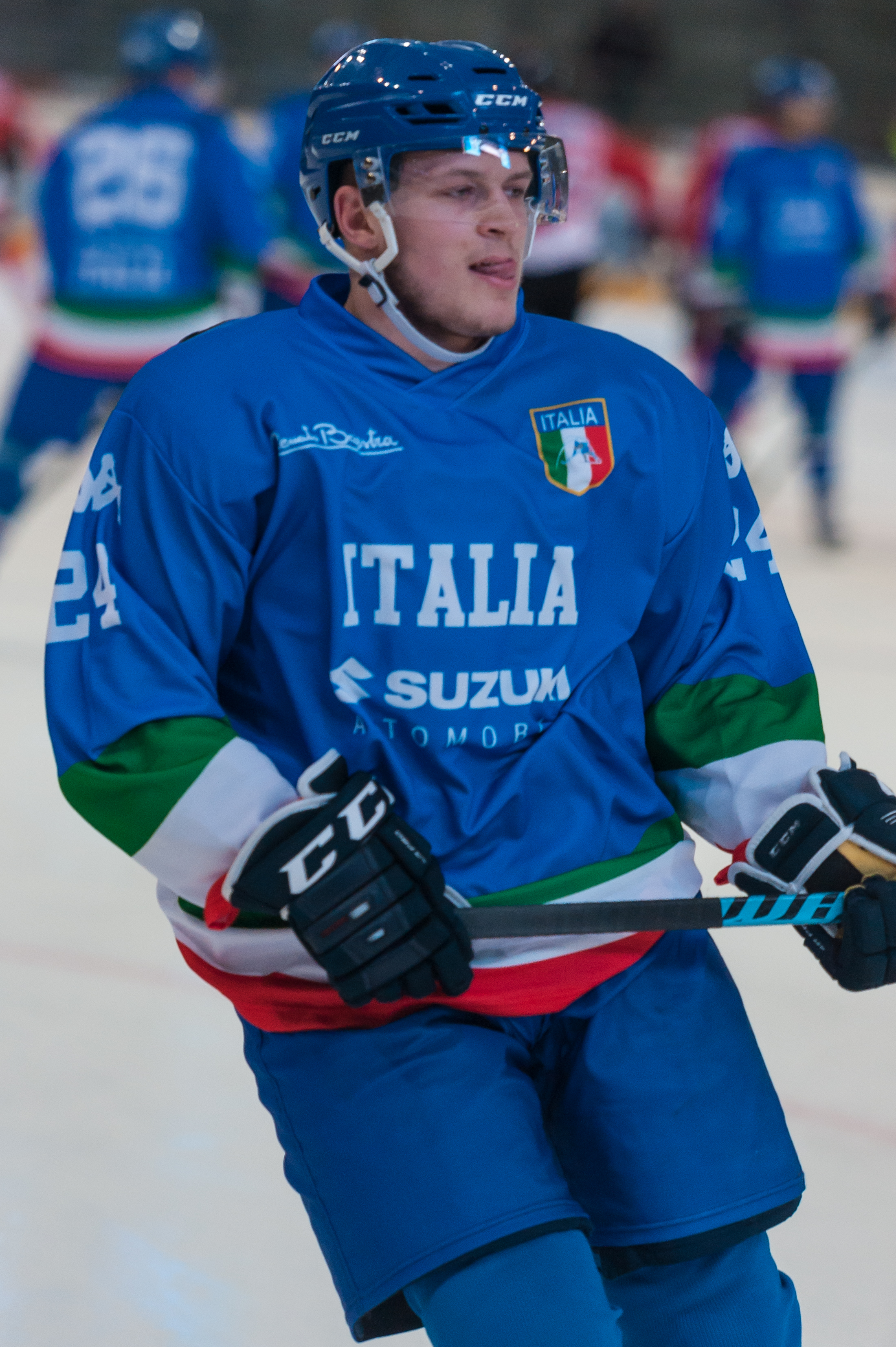 Freundschaftliches Eishockey-Länderspiel - Österreich vs Italien. Bild zeigt Joachim Ramoser (ITA).